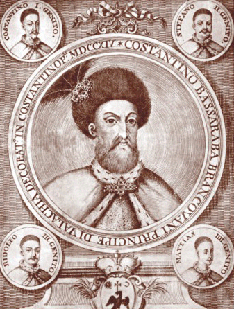 Constantin Brâncoveanul